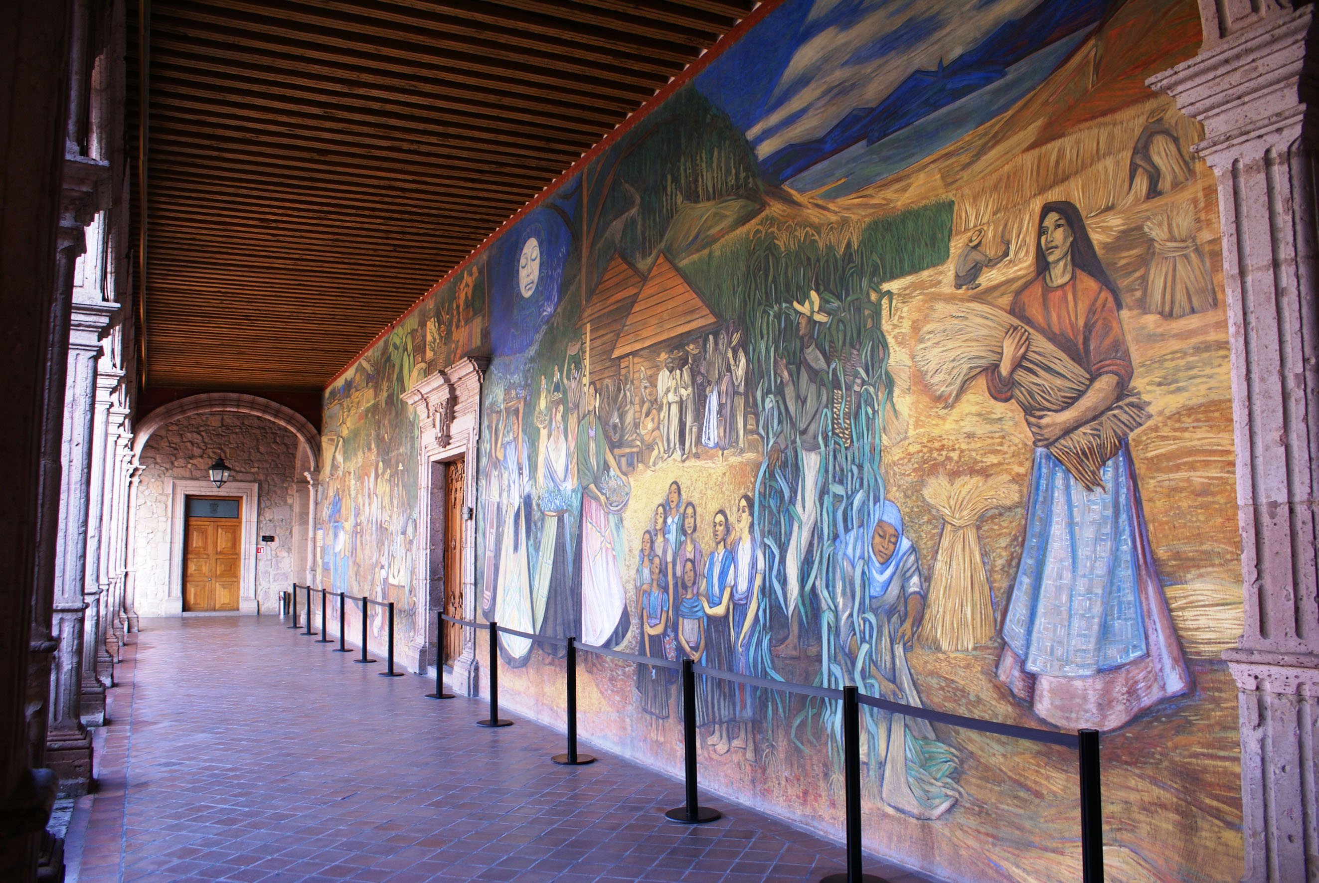 Fragmento de pintura mural Titulo del mural: “Gente y paisaje de Michoacán” Autor: Alfredo Zalce Año: 1962 Ubicación: Palacio de Gobierno de Michoacán Morelia, Michoacán, México.